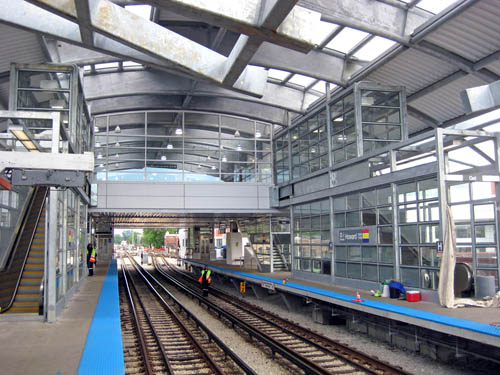 Photo de la station Howard